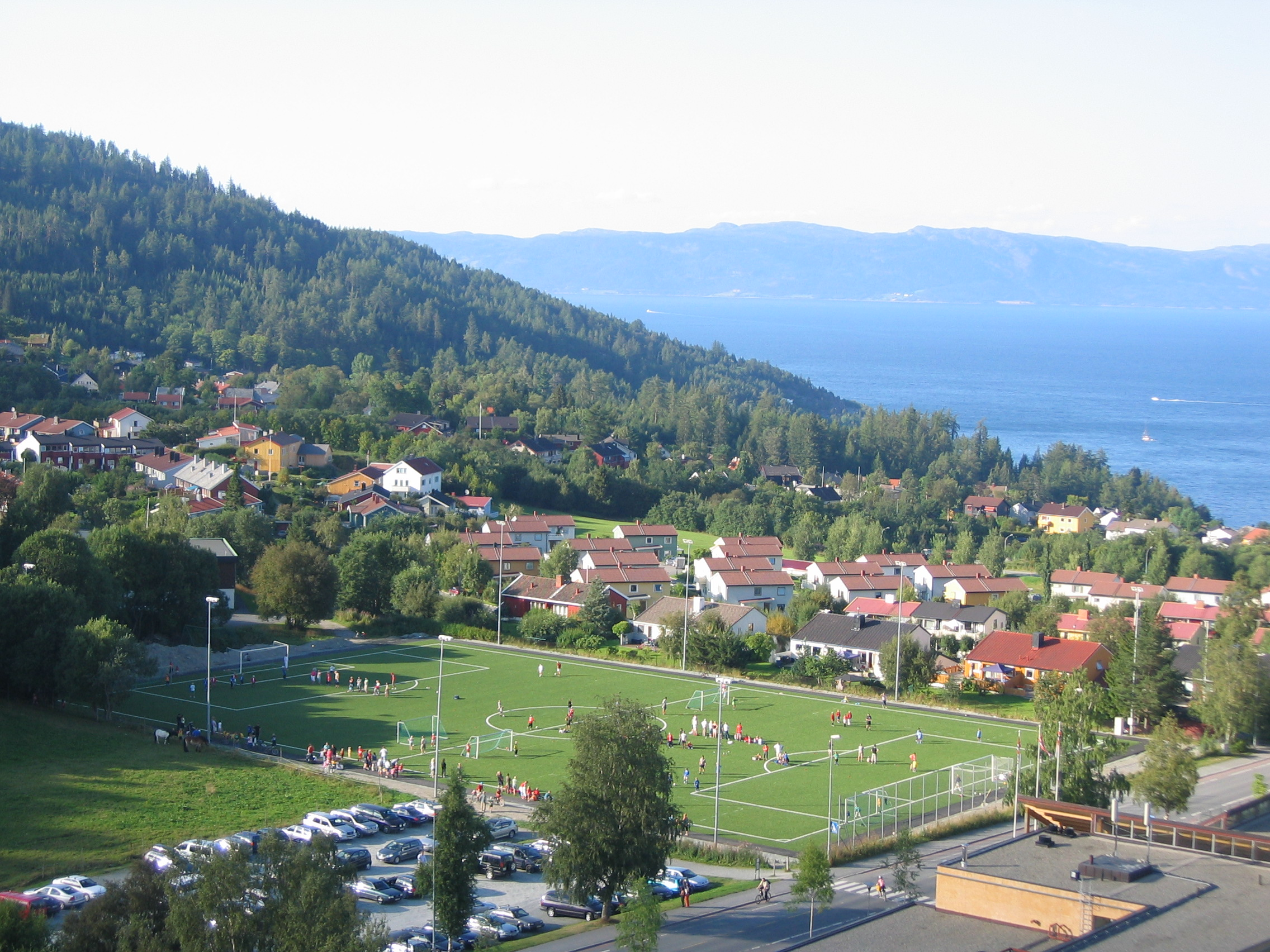 Hammersborg, Vestbyen football stadion